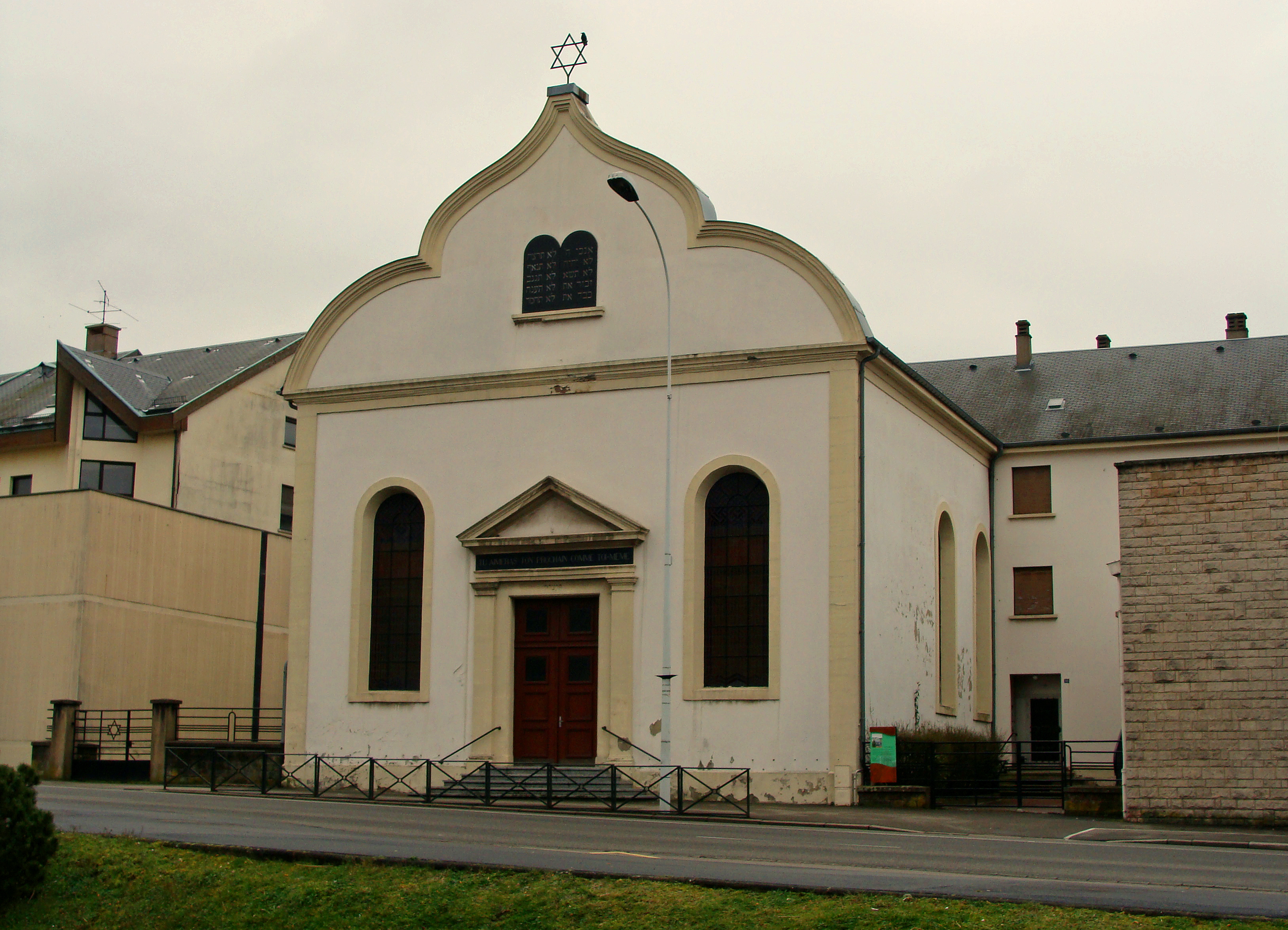 Synagogue de Forbach, avenue Saint-Rémy, construite de 1835 à 1836.